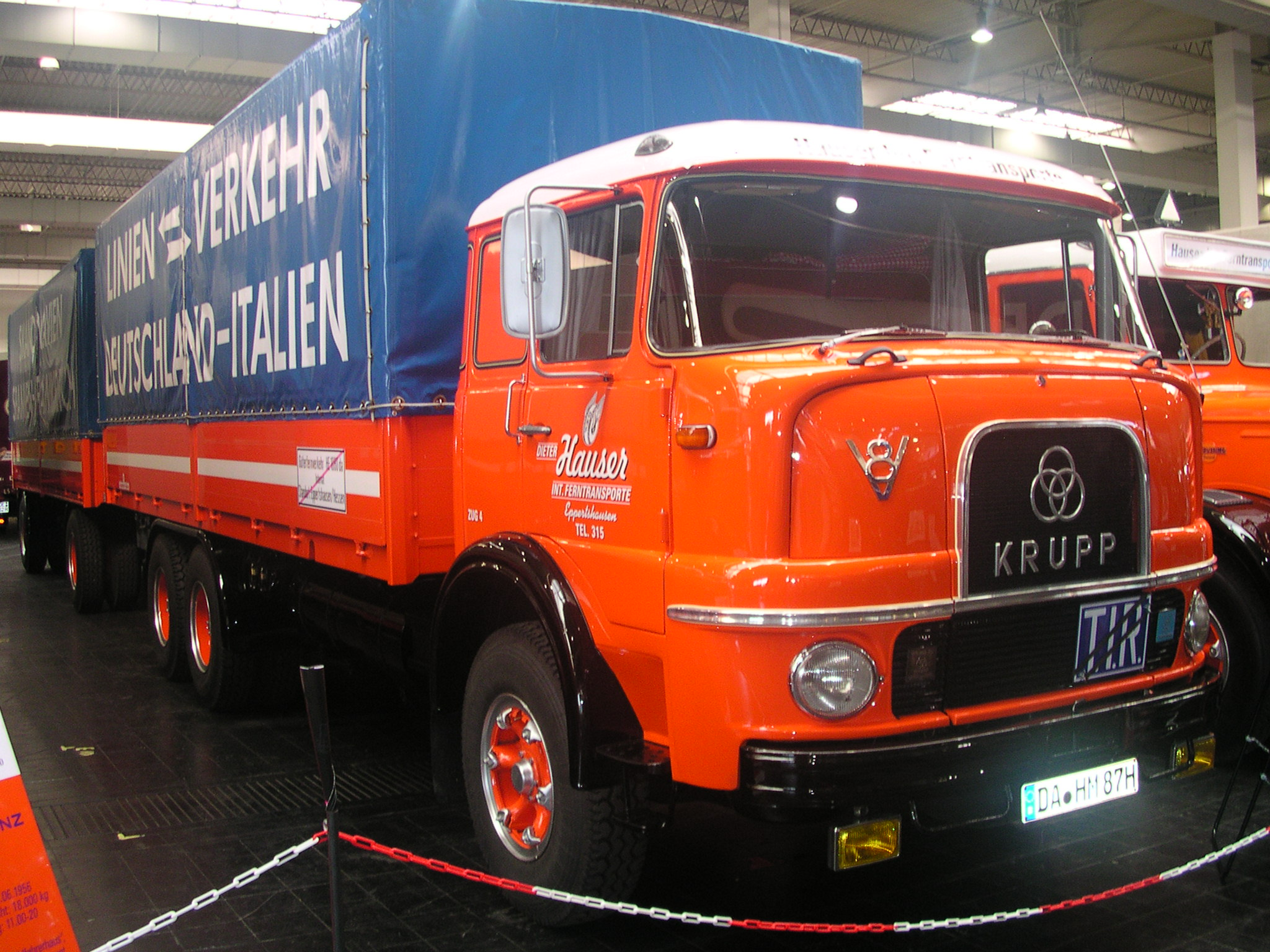 Krupp LF 380, Baujahr 1968, V8-Dieselmotor mit 12849 ccm Hubraum, 194 Kw (265 PS), kippbare Fernverkehrskabine. Anhänger Kässbohrer V14 I, Baujahr 1968, beide mit Zollverschluß (erkennbar an den vertikalen Bändern über der Plane) Nutzfahrzeug-IAA in Hannover